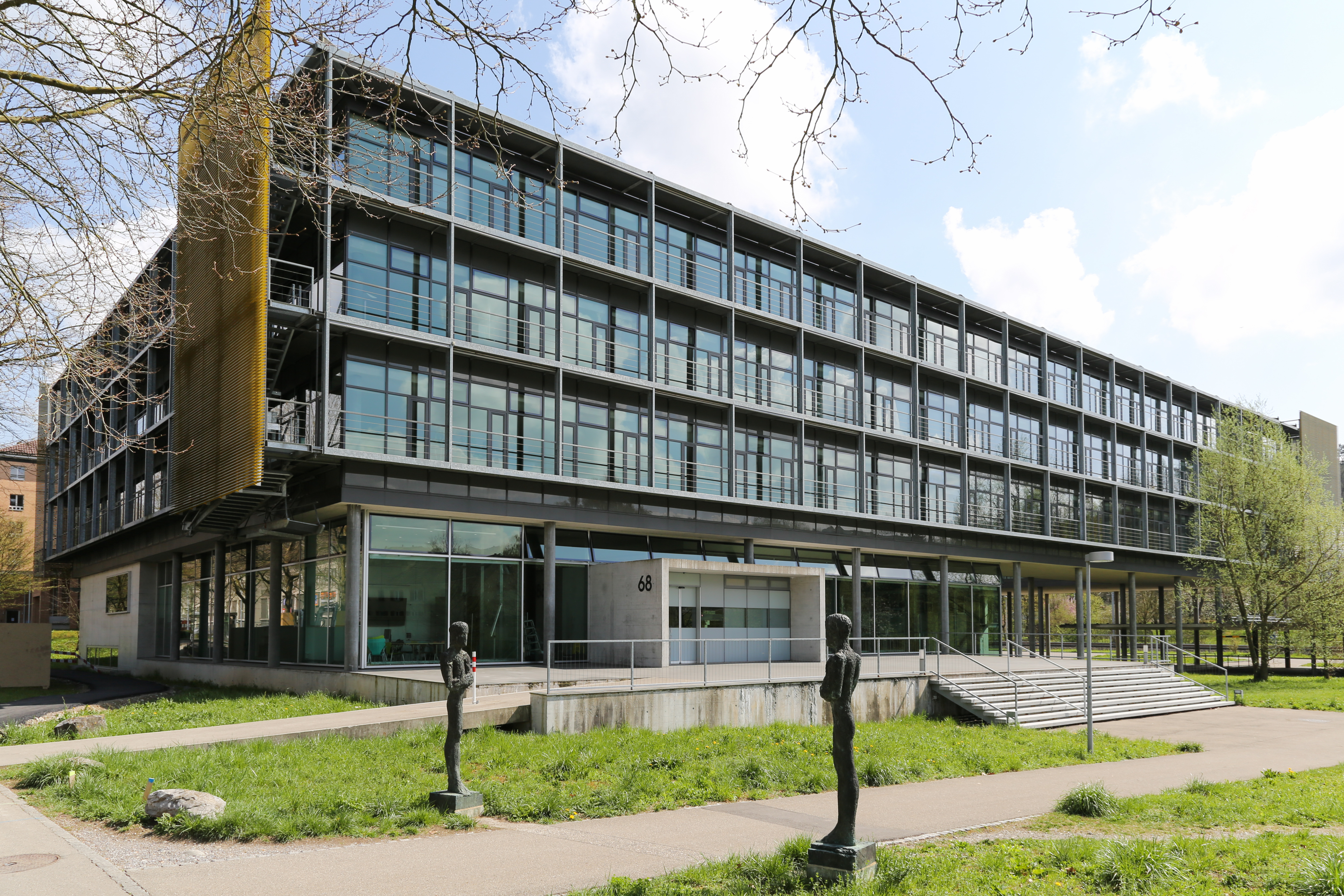 Bundesamt für Umwelt BAFU in Ittigen, Ansicht aus nordwestlicher Richtung